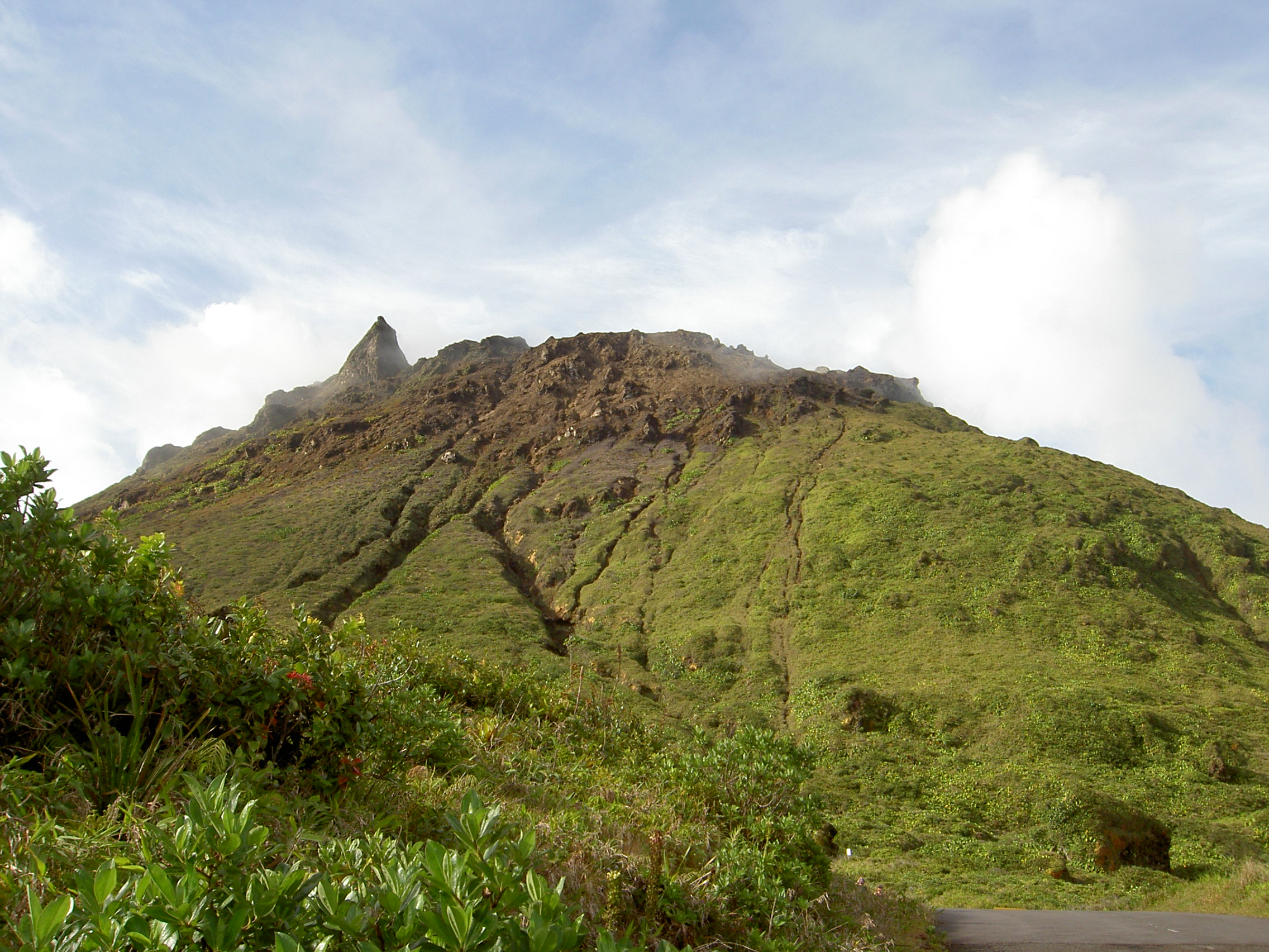 Sommet de la Soufrière 1467m - 2 - Guadeloupe